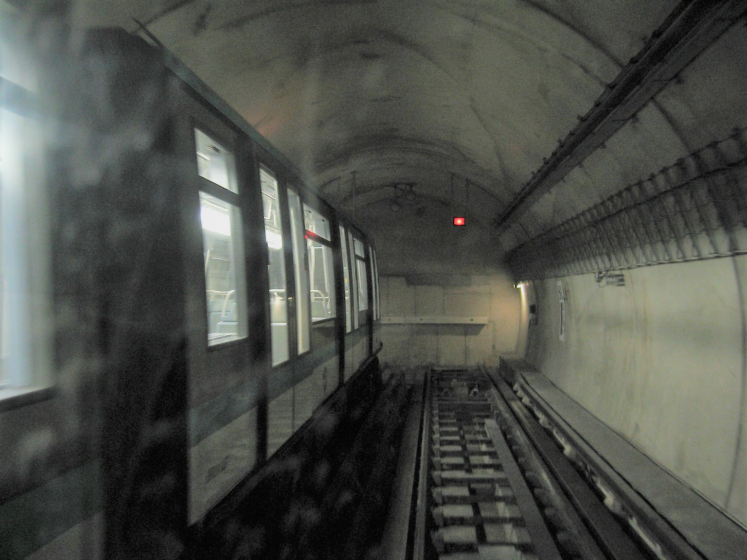 Fin du tunnel de la ligne 14 à St Lazare, pris lors du halloween express 2005